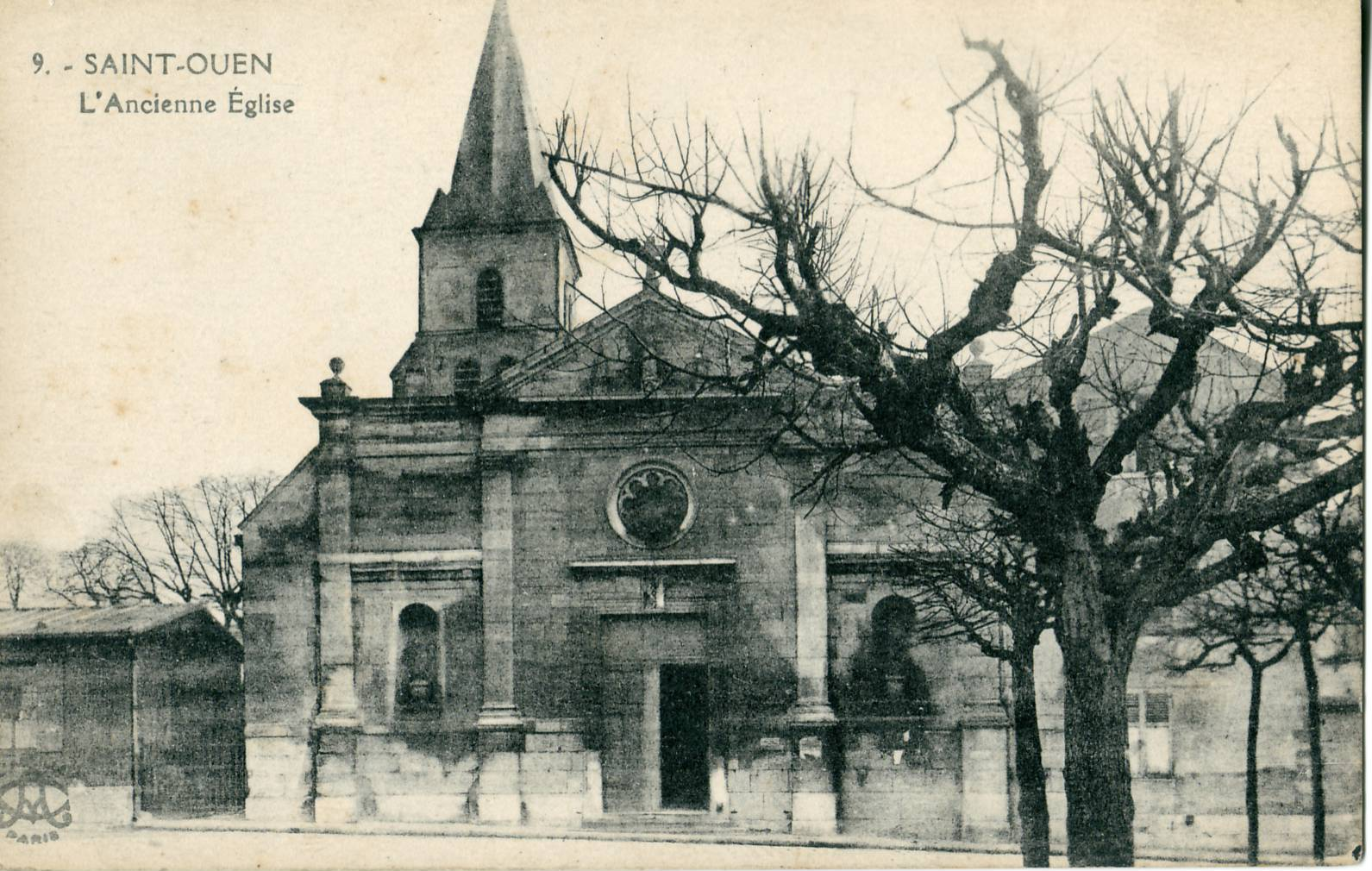 Carte postale ancienne éditée par Abeille à Paris, N°9Saint-Ouen (93) : L'ancienne église